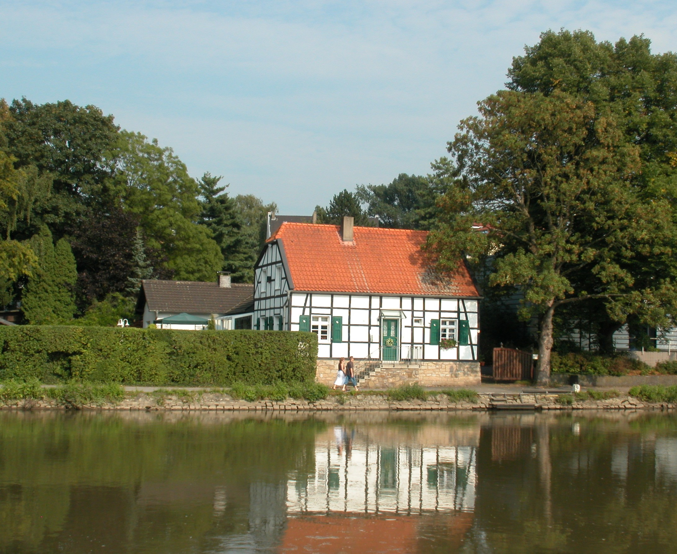 Bootshaus Böhm, ehemalige Treidelstation in Mülheim Objekt:51°25′3.6″N 6°52′34.7″E / 51.417667°N 6.876306°E Standort:51°25′4.0″N 6°52′31.9″E / 51.41778°N 6.875528°E